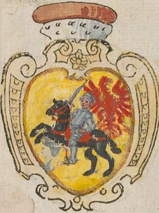 Беларуская (тарашкевіца): Герб Падляшша (Padlašša) з Пагоняй (Pahonia)